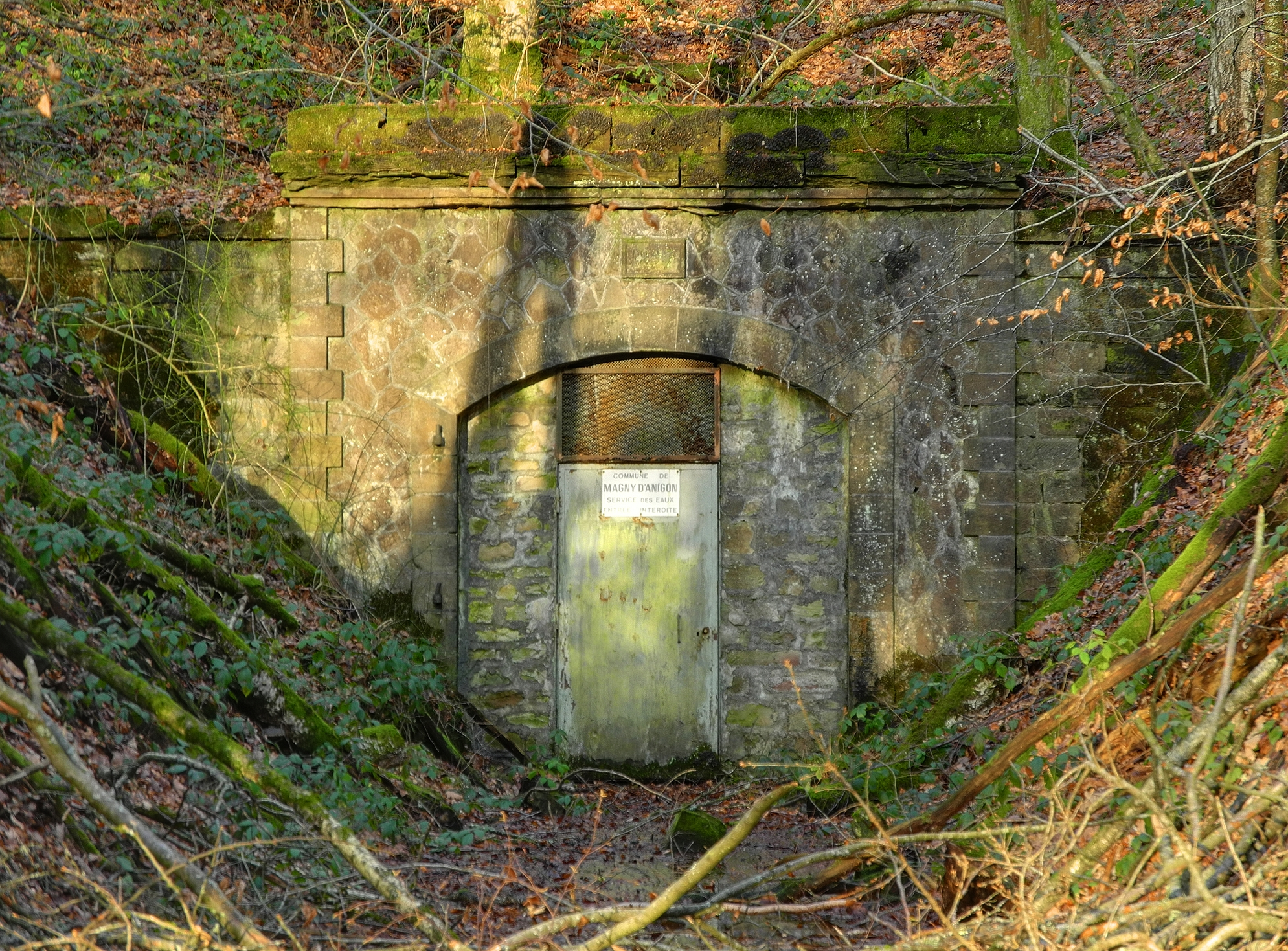 Entrée du tunnel ferroviaire des Houillères de Ronchamp reliant le puits Arthur de Buyer au puits du Magny (HDR).